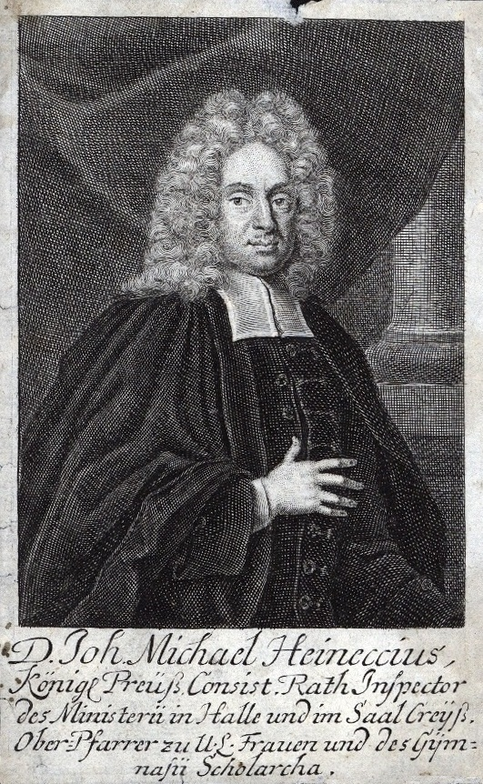 Johann Michael Heineccius (1674-1722) als Oberpfarrer und Konsistorialrat in Halle (Saale)